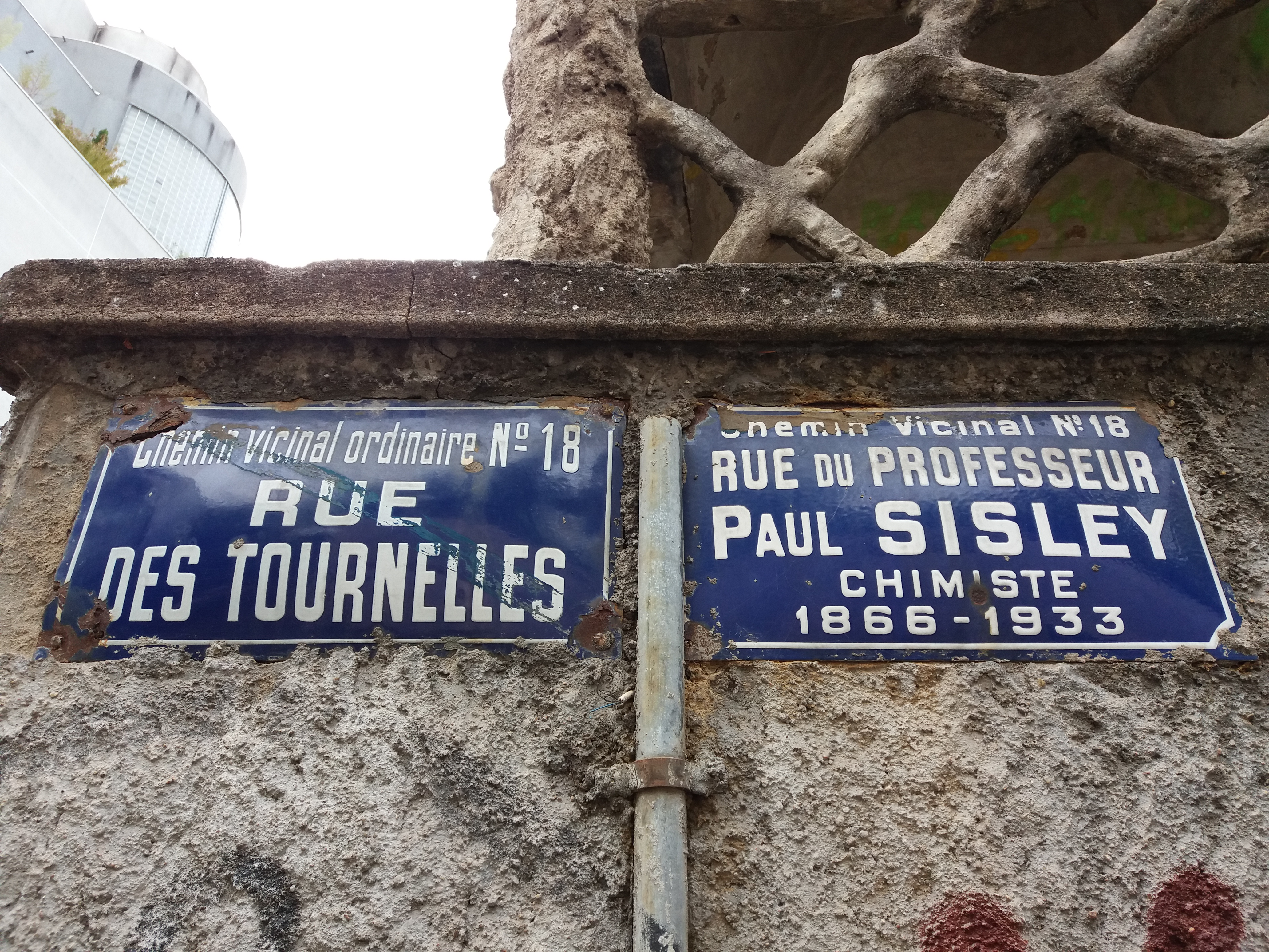 Plaque chemin vicinal N° 18, ancienne plaque rue des Tournelles.